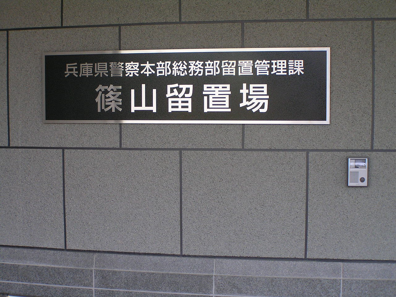 兵庫県警察本部総務部留置管理課・篠山留置所